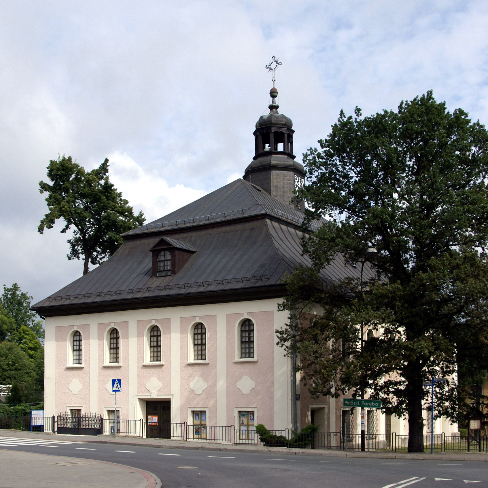 Kościół pw. Najświętszego Serca Pana Jezusa w parafii św. Marcina w Sobieszowie (zabytek nr rejestr. A/2126/655/J)